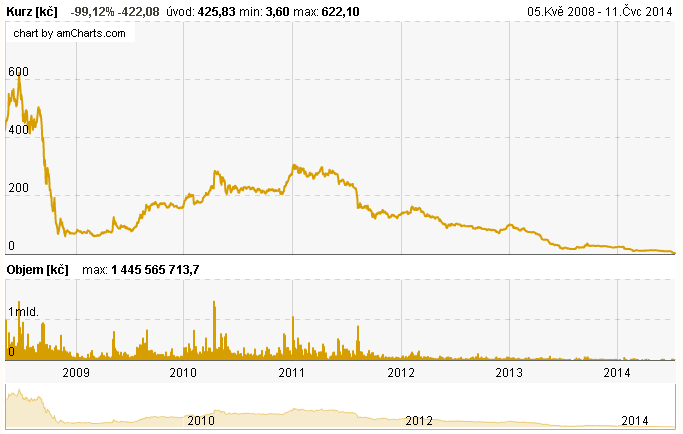 Akcie NWR - Graf vývoje kurzu na Burze Praha.